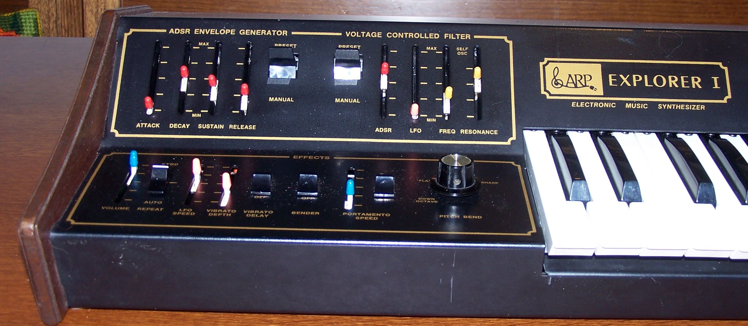 ARP Explorer effects panel